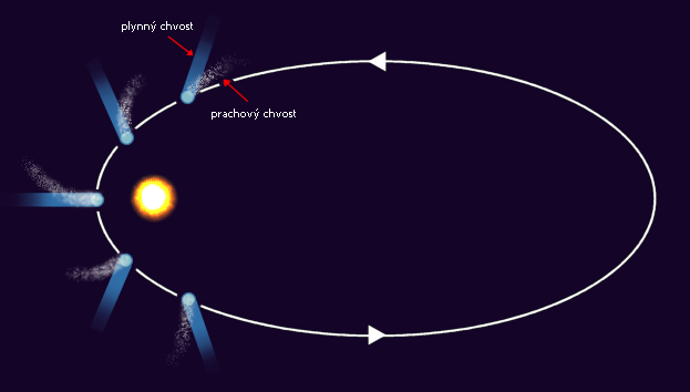 Kategória:Astronomické obrázky